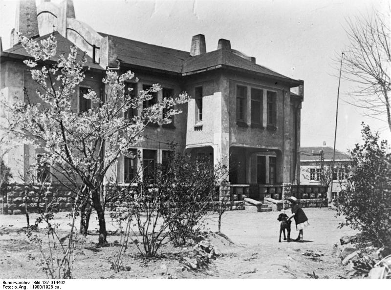 Tsingtau, "Deutsches Heim" China, Tsingtau "Deutsches Heim", beherbergt auch die deutsche Schule. Ehemals christliches Soldatenheim